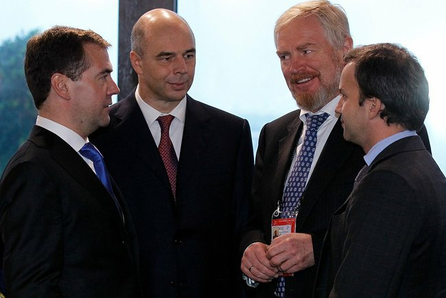 Перед началом рабочего заседания глав государств и правительств стран - участниц «Группы двадцати».